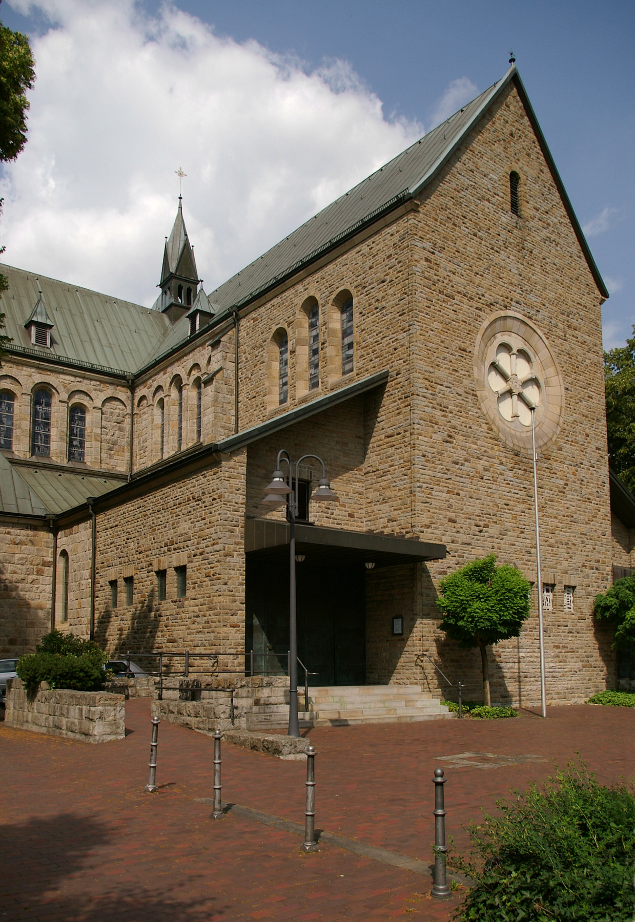 Marienkirche in Schwerte, Nordrhein-Westfalen, Ansicht von Westen auf den Anbau von 1964